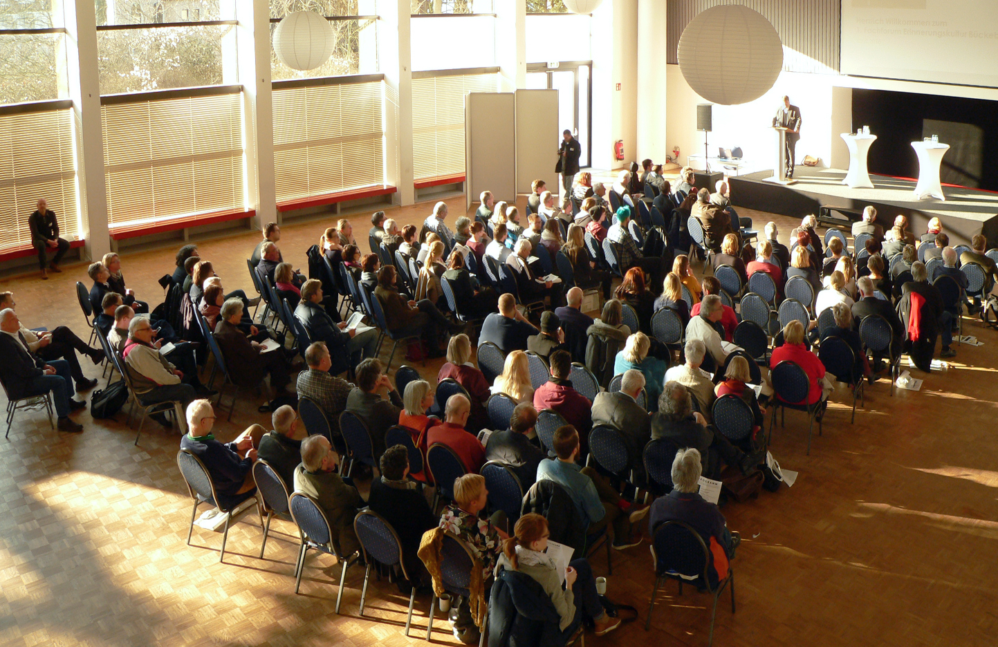 Fachforum zur Erinnerungskultur Bückeberg Hameln in der Alten Schwimmhalle